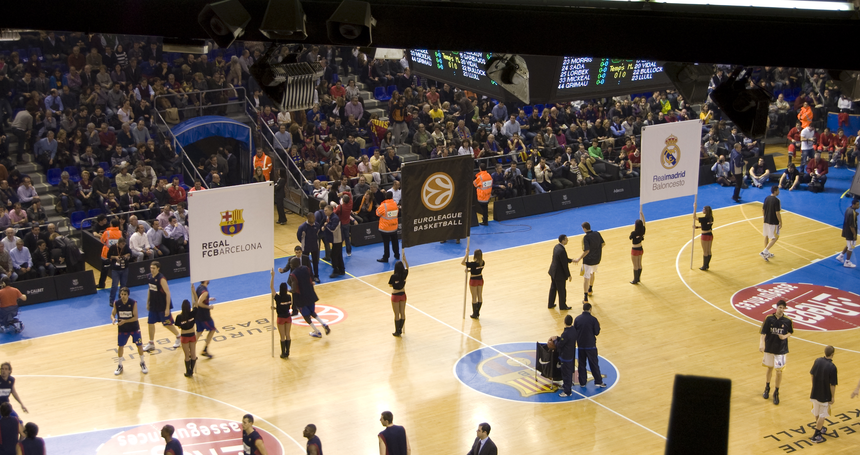 Primer partit al Palau Blaugrana